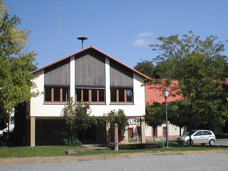 Bürgeramt in Mittelschefflenz